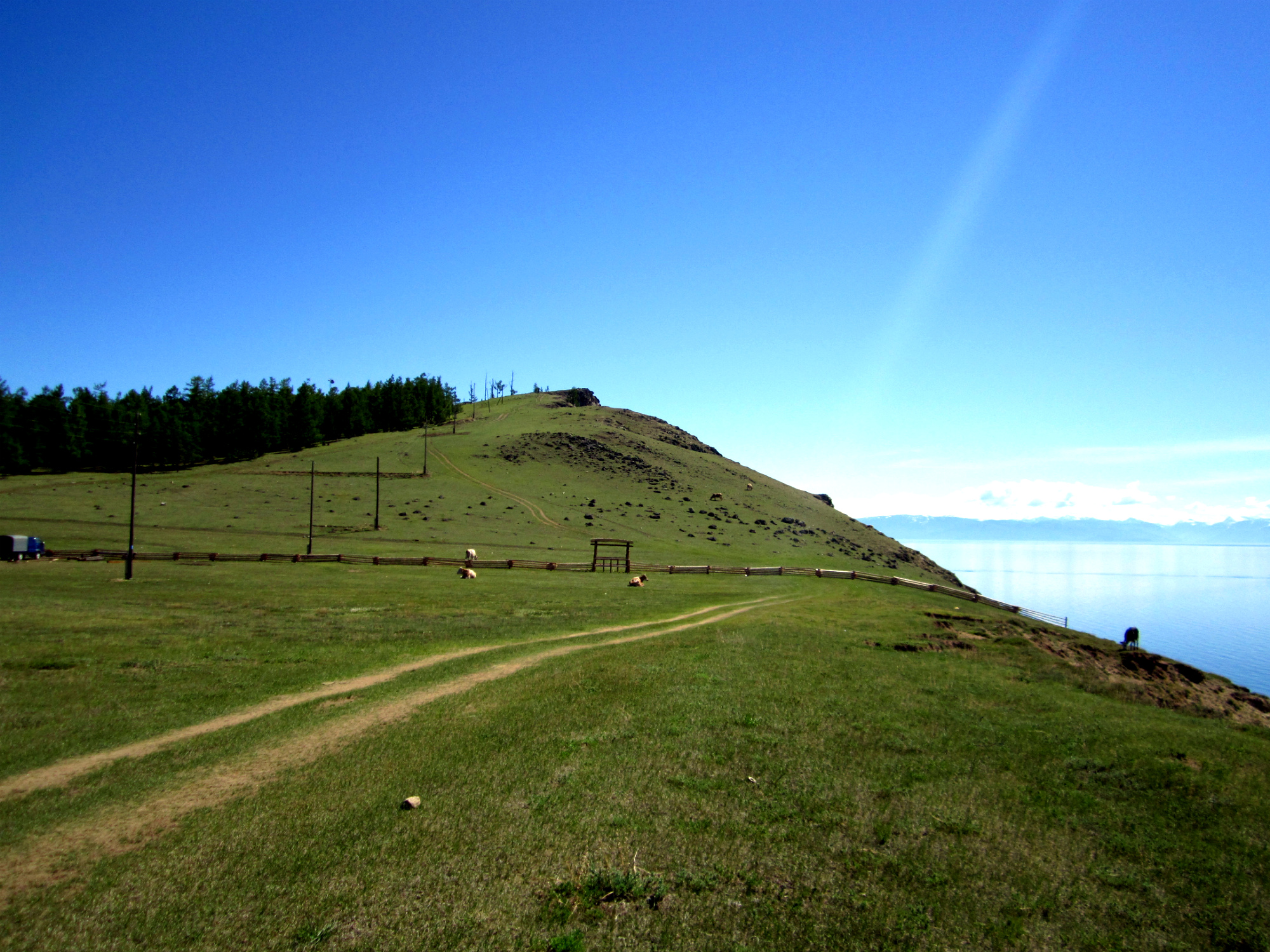 Губа Аяя, Северо-Байкальский район This image is related to the protected area of Russia number 0310087